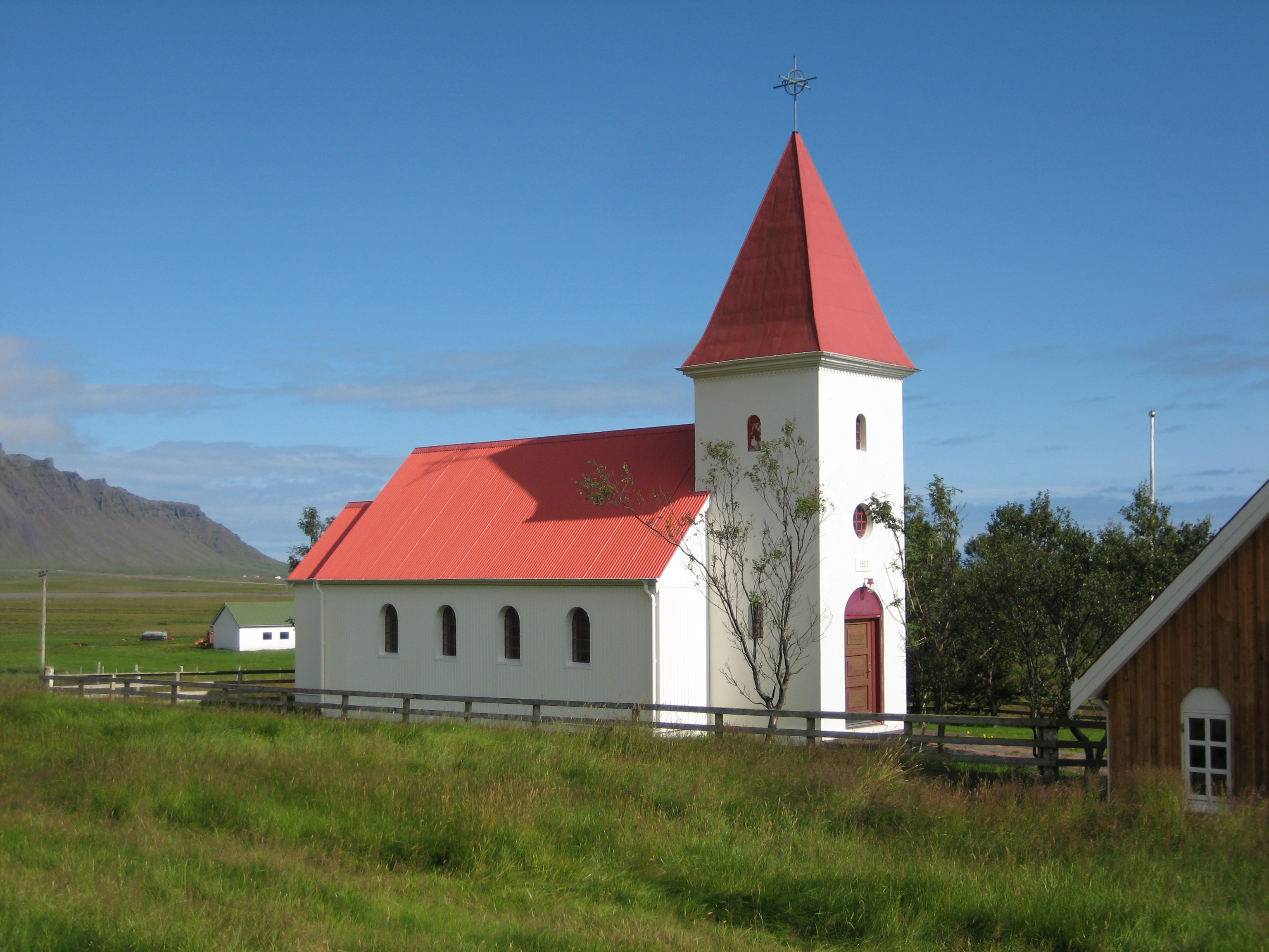 Kálfafellsstaðarkirkja, Suðursveit, Iceland.